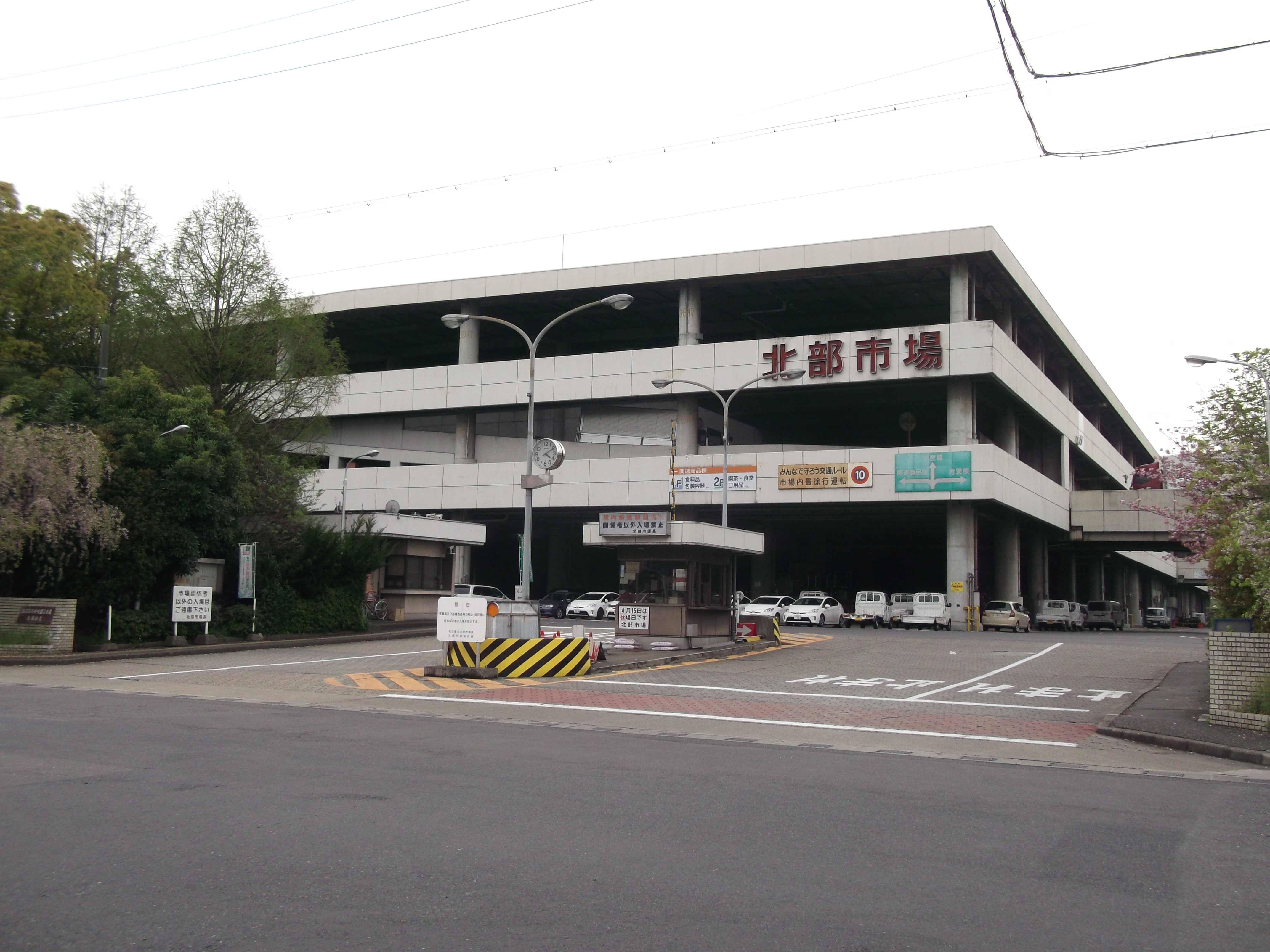 愛知県西春日井郡豊山町に位置する名古屋市北部市場を東側公道北側より撮影